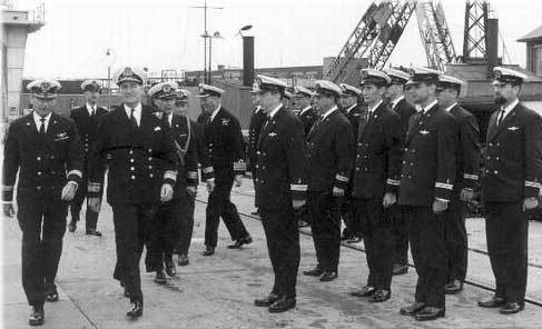 מסדר קבלת הצוללת הבריטית 'טוטם' לחיל הים שתקרא 'אח"י דקר', 1965.